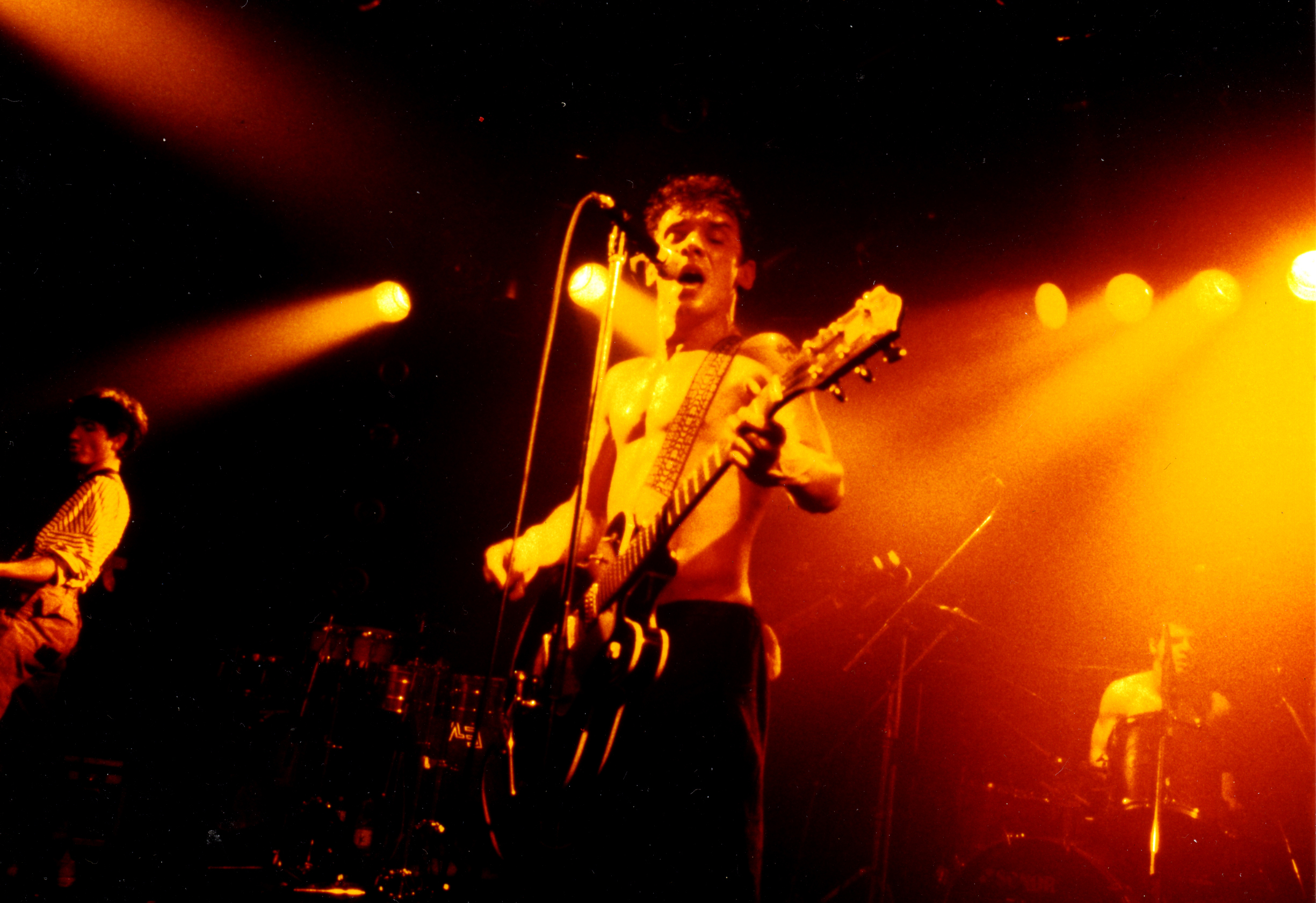 Mano Negra 1990 club quatro, Shibuya, Tokyo